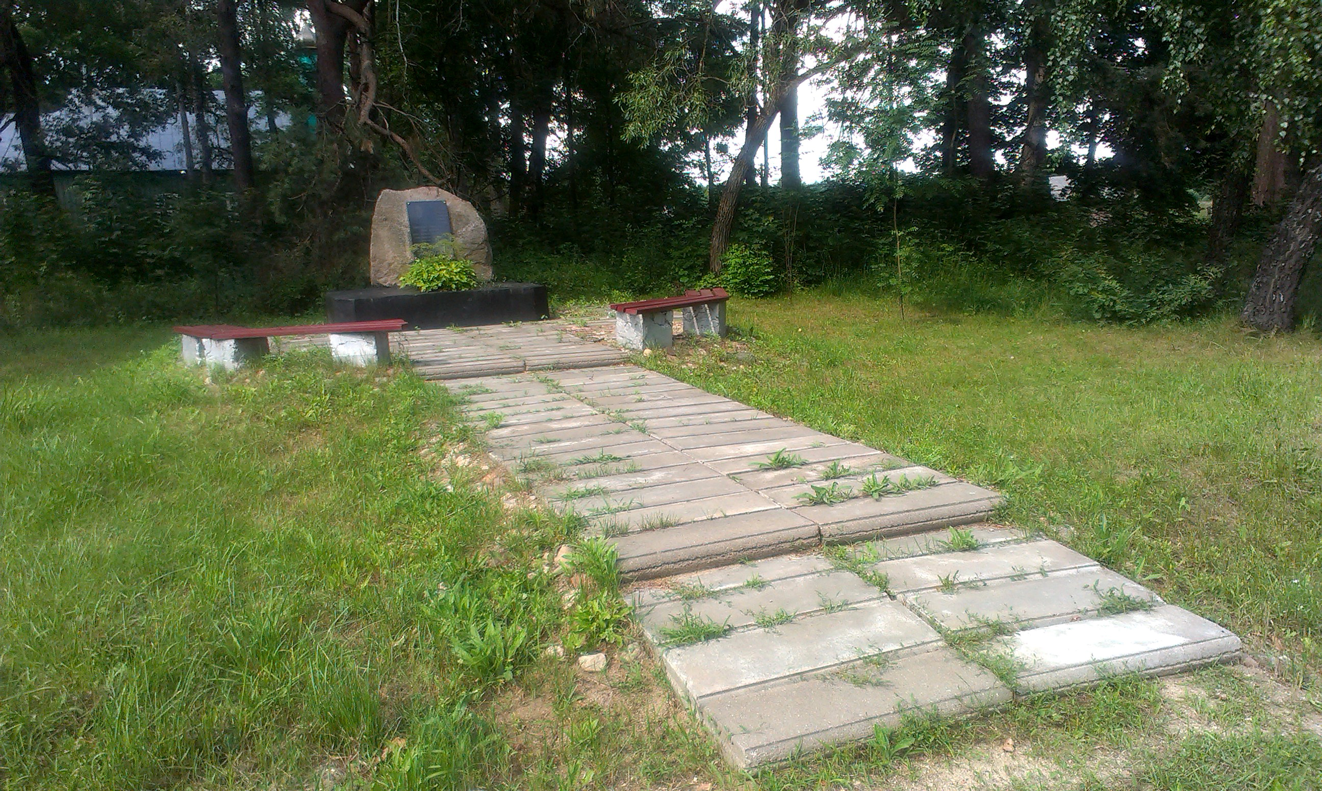 У Такарах нарадзіўся Усевалад Макаравіч Ігнатоўскі